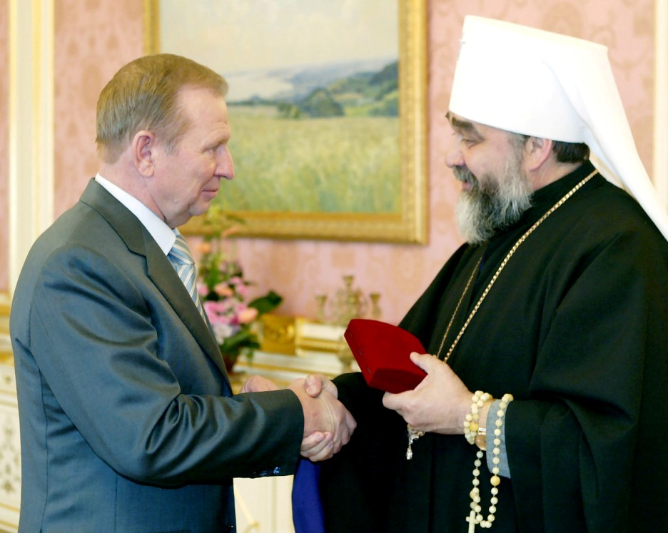 Фото нагородження Предстоятелем УАПЦ, Митрополитом Київським і всієї України, Блаженнішим Мефодієм Леоніда Кучми найвищою нагородою Української Автокефальної Православної Церкви - орденом Андрія Первозванного